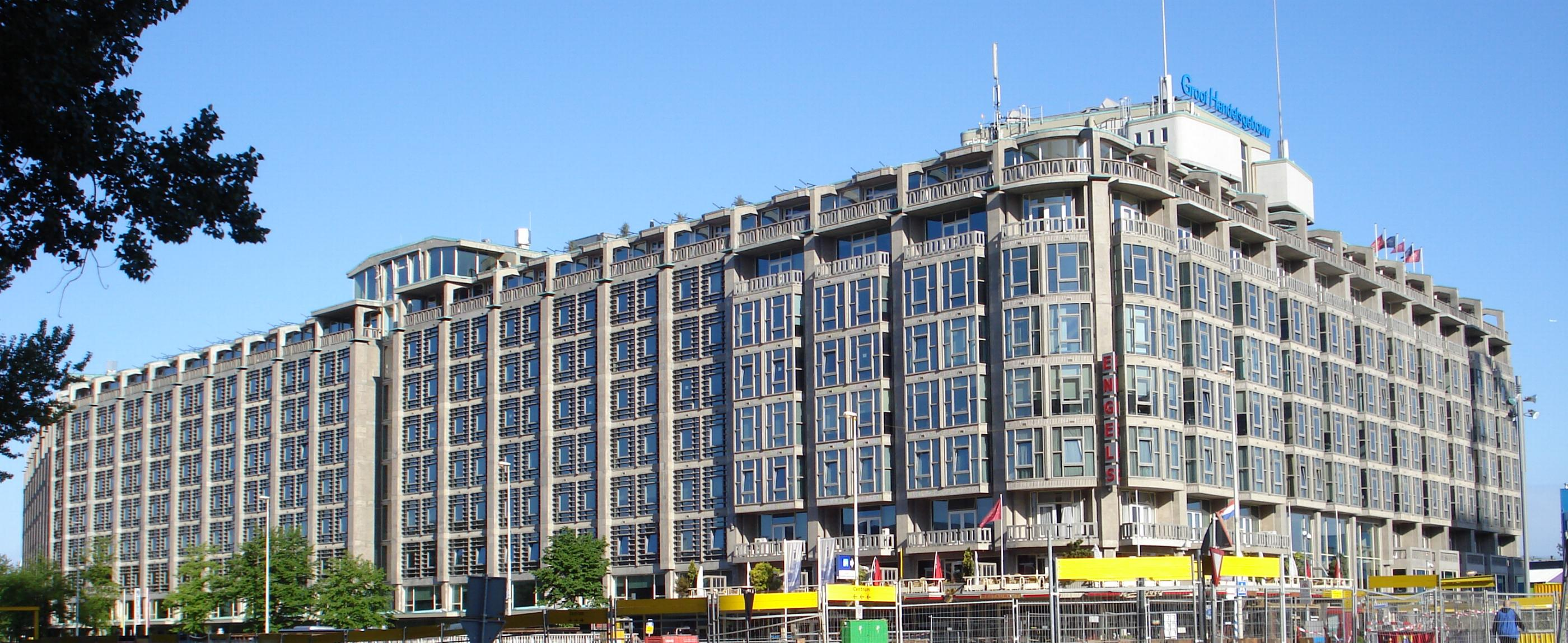 Rotterdam, Groothandelsgebouw. Voorgedragen als rijksmonument, oktober 2007.